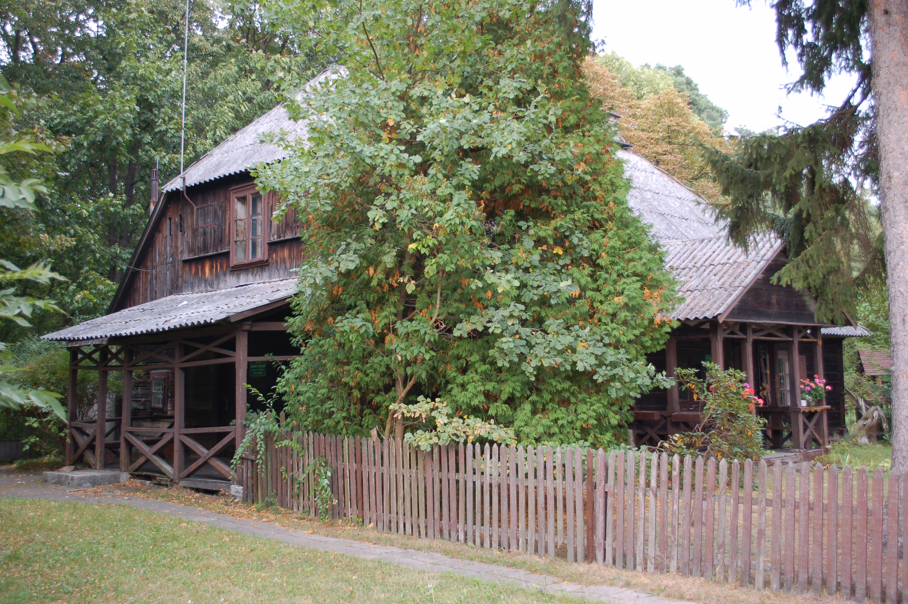 Powsin Park Warsaw, Forester's lodge "Przy Lesniczowce", or: "Leśniczówka", ca. 1890, ul. Rydzowa 1 (close to Powsin Culture Park), protected (nr 1285) since September 11th. 1987